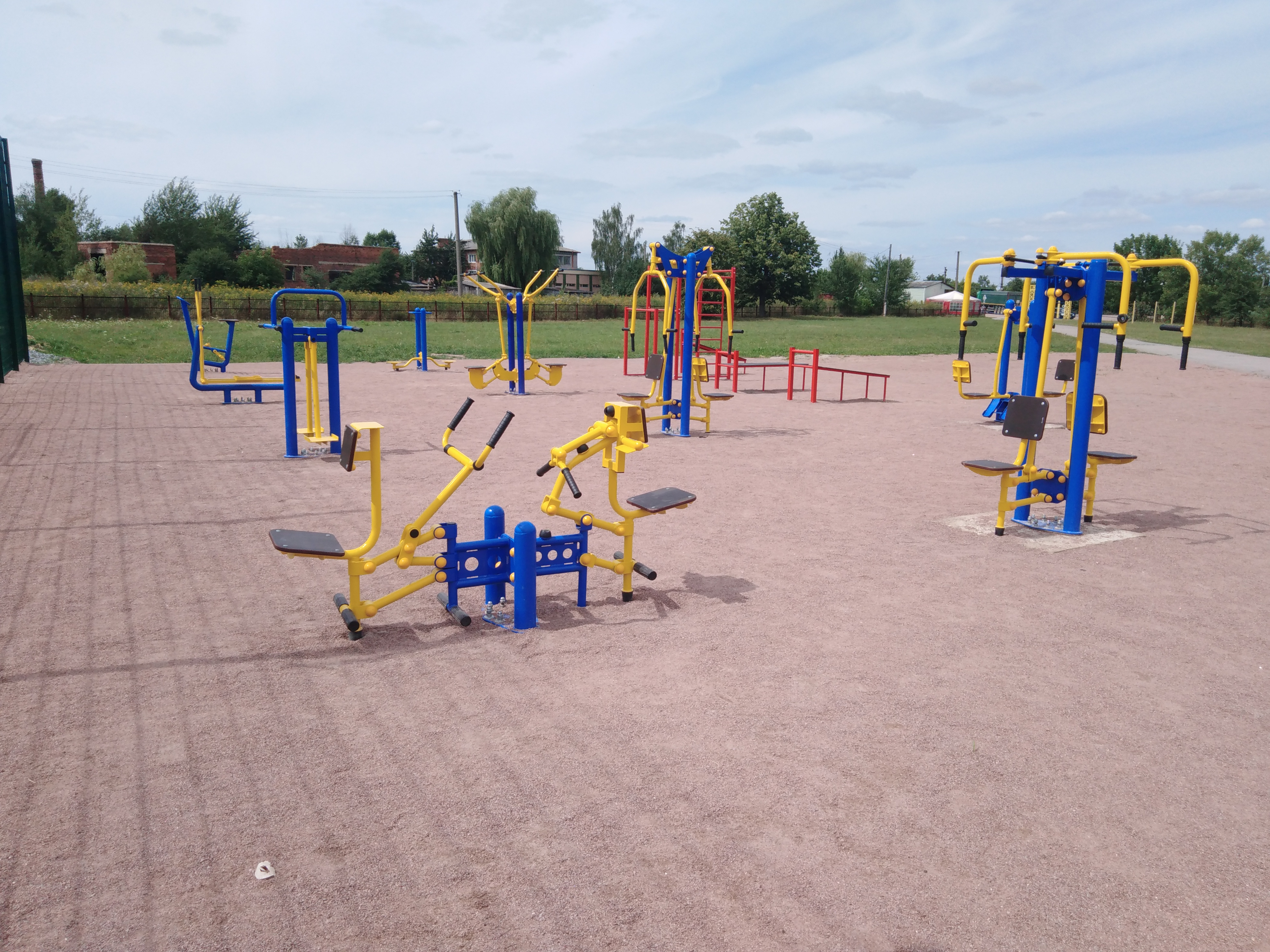 Тренажери